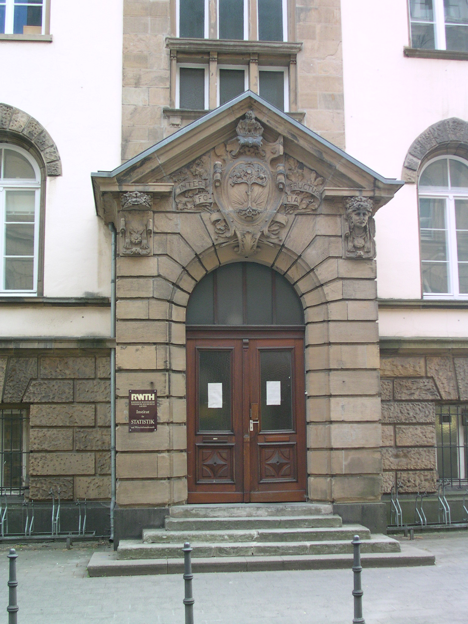 Aachen, Statistikinstitut und Lehrbuchsammlung der RWTH Aachen, Wüllnerstraße